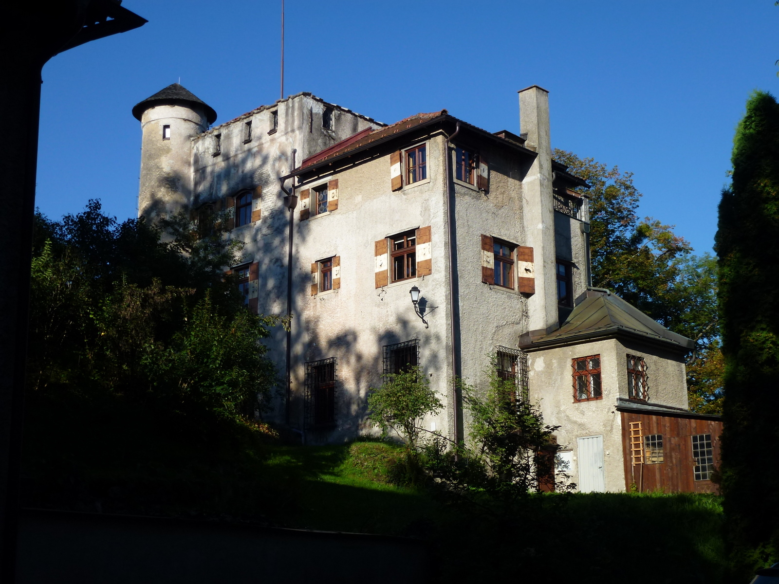 Konstantinturm oder Kupelwieser-Schlössl, Mönchsberg, Salzburg